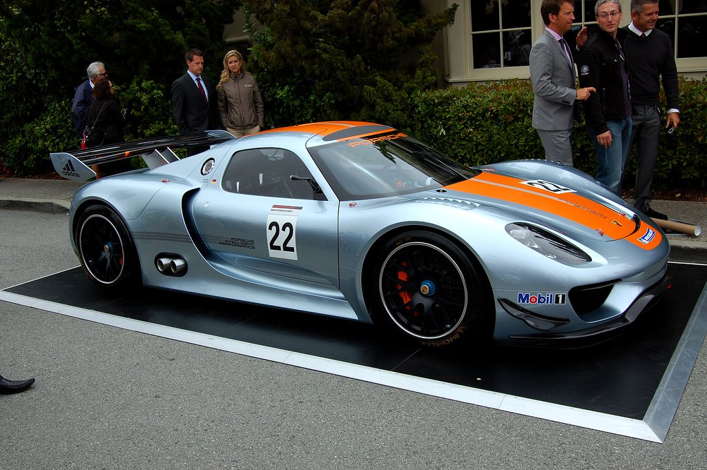 Porsche 198 RSR